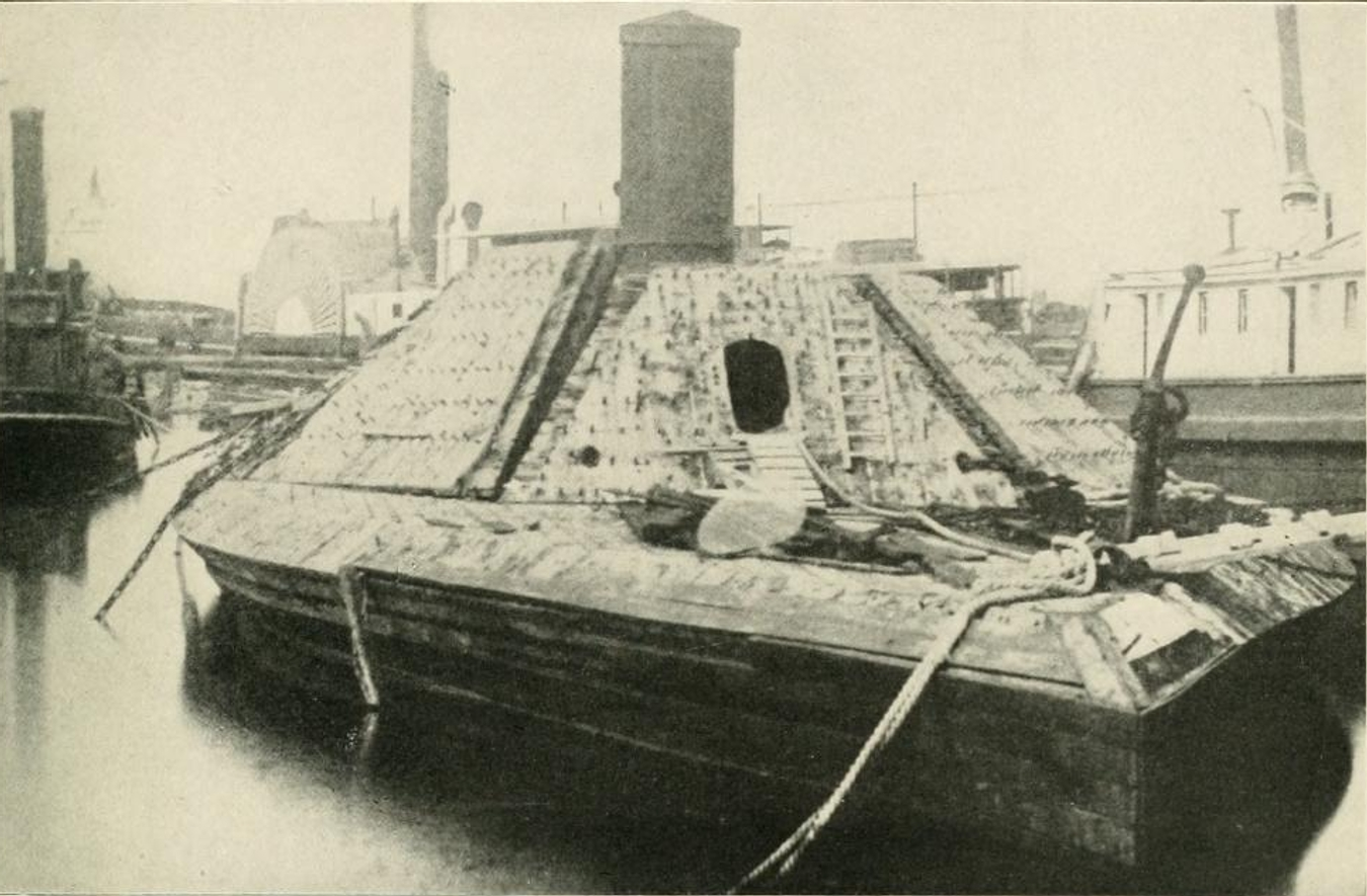 CSS Albemarle